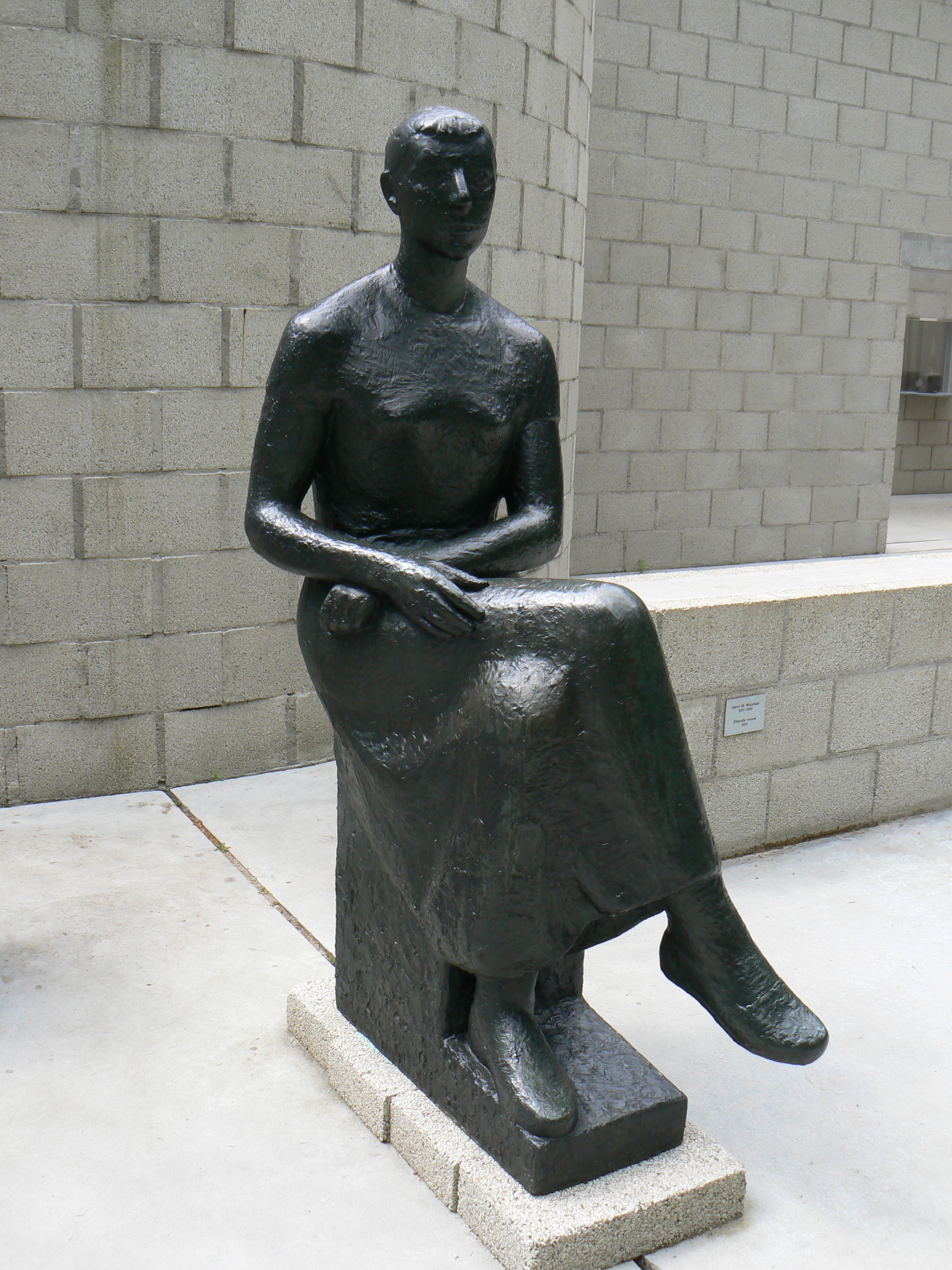 sculpture Zittende vrouwenfiguur (1953) by Han Wezelaar in KMM Sculpturepark/The Netherlands